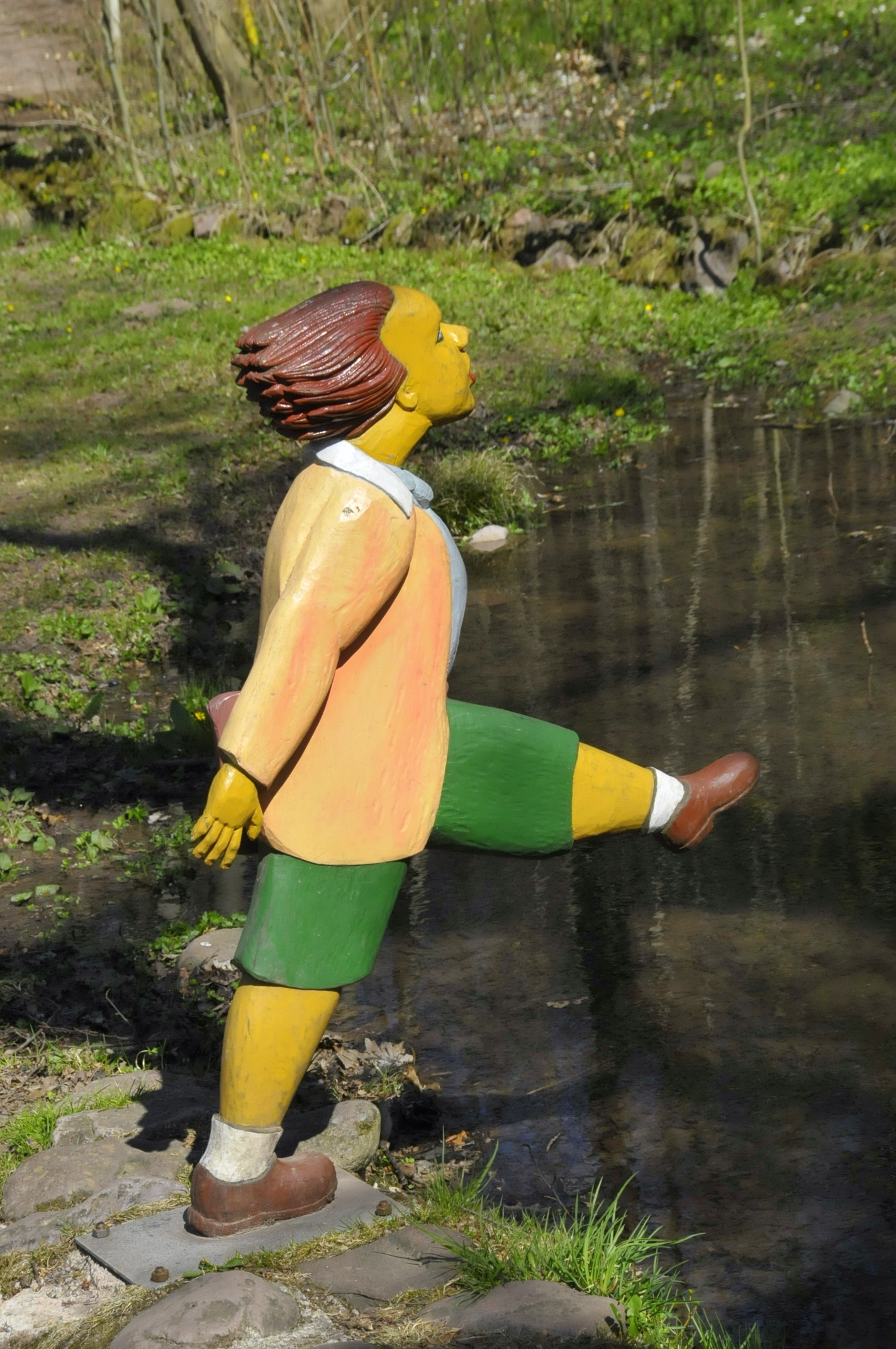 Tabarz, der "Hans Guck-in-die-Luft"